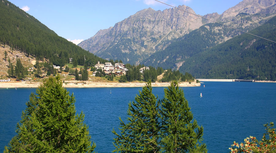 L'abitato di Ceresole Reale (TO) sulla sponda del lago omonimo